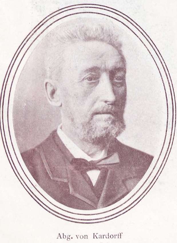 Wilhelm von Kardorff (1828-1907), preußischer Politiker, Reichstagsabgeordneter und Unternehmer.